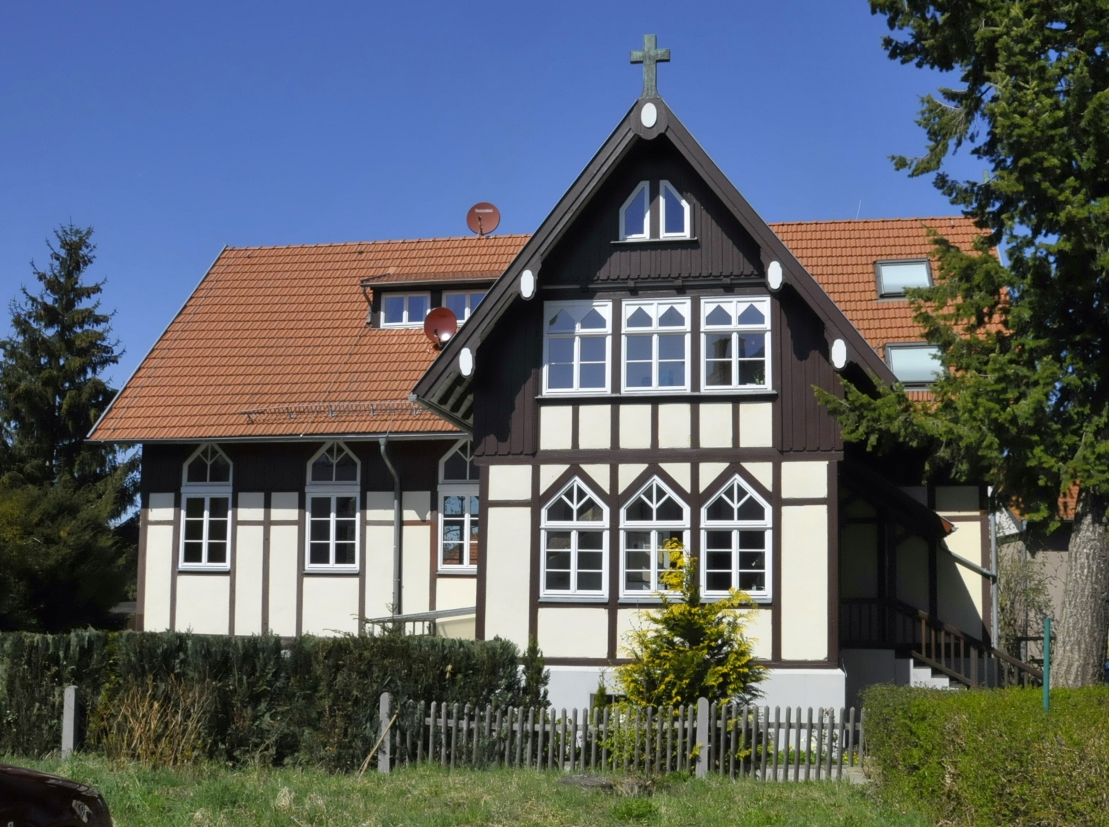 Tabarz, kathol. Kapelle